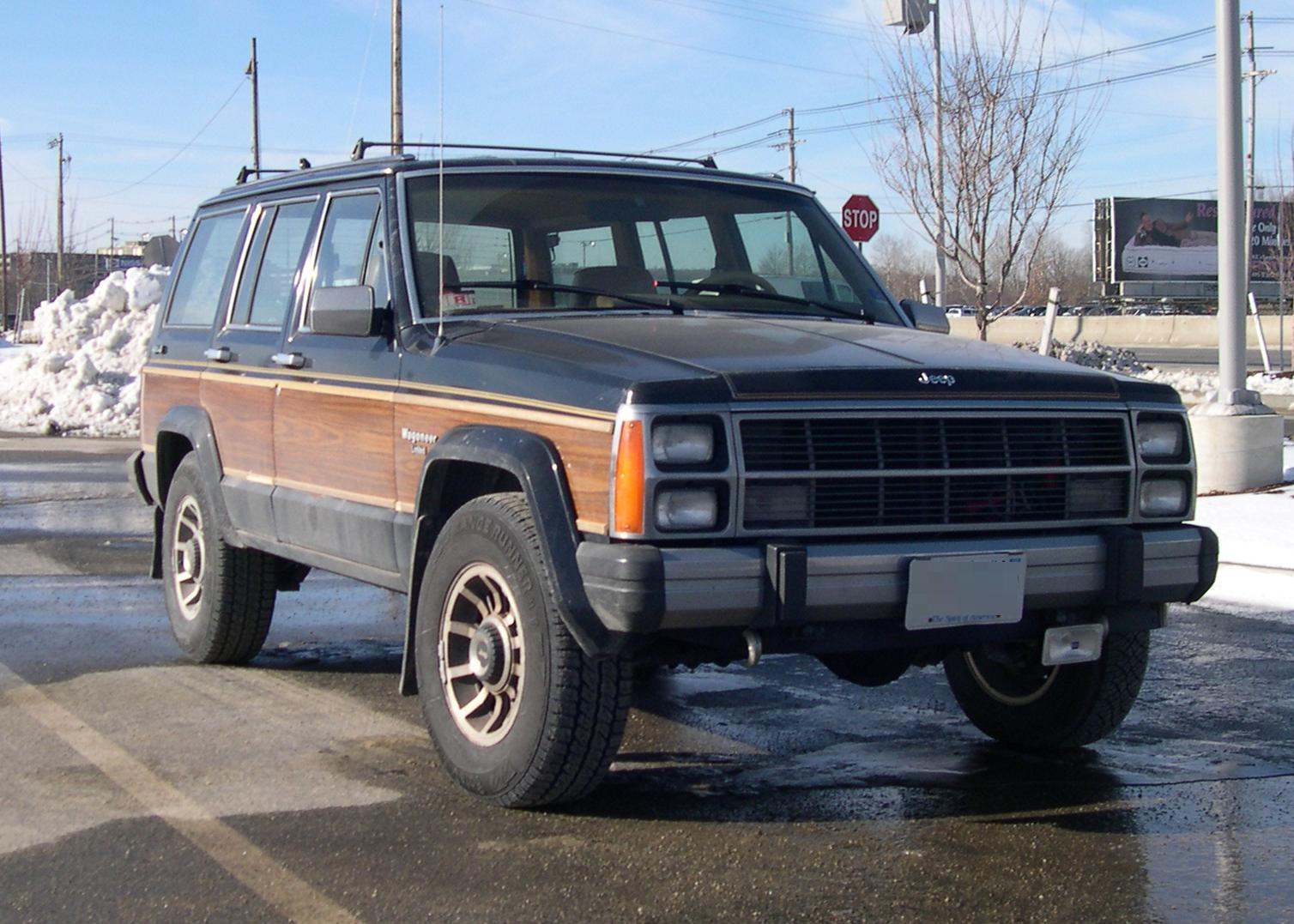 Jeep Wagoneer (XJ)